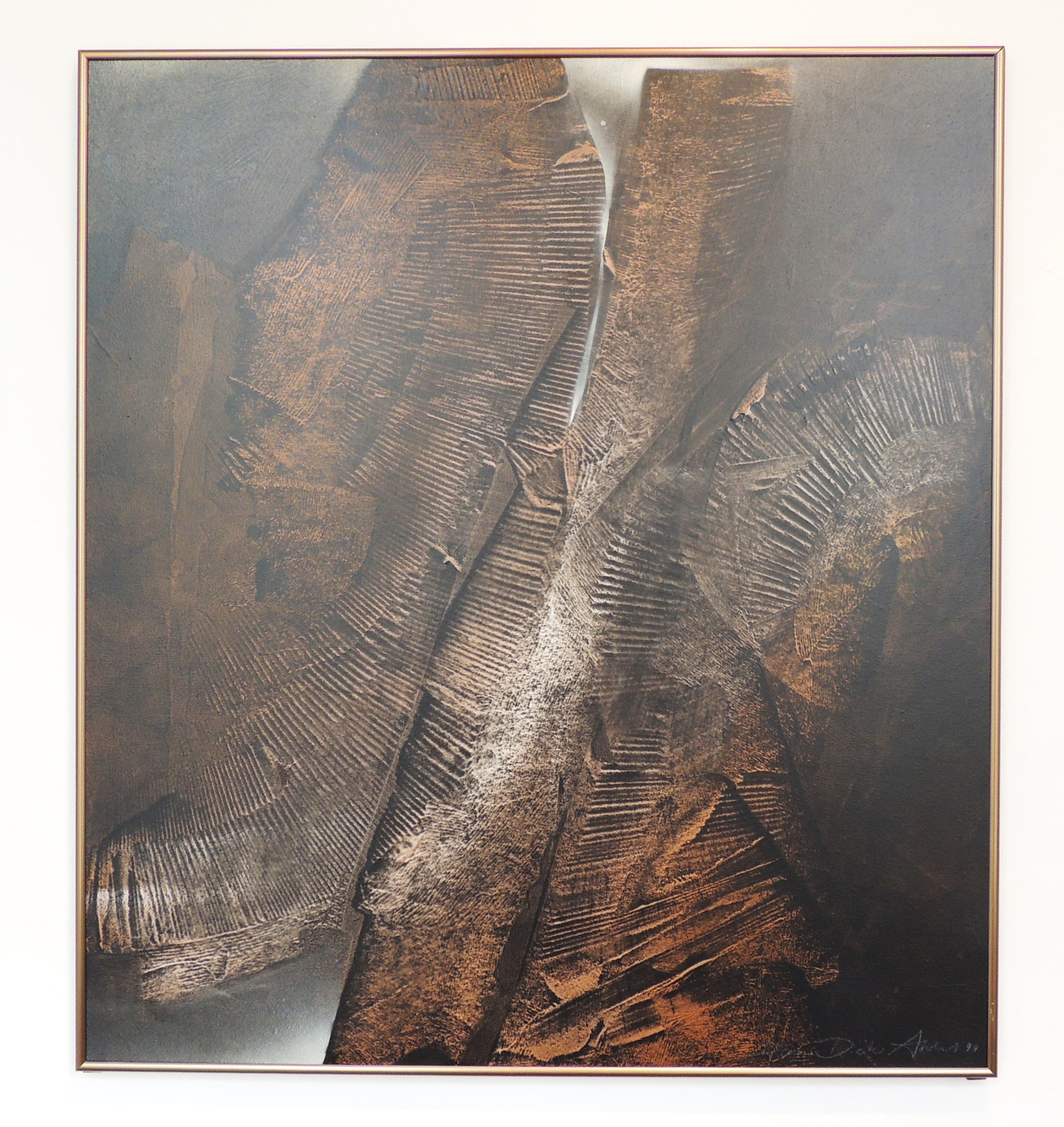 Hans-Dieter Ahlert: ohne Titel. Mischtechnik 90x100 cm, 2020